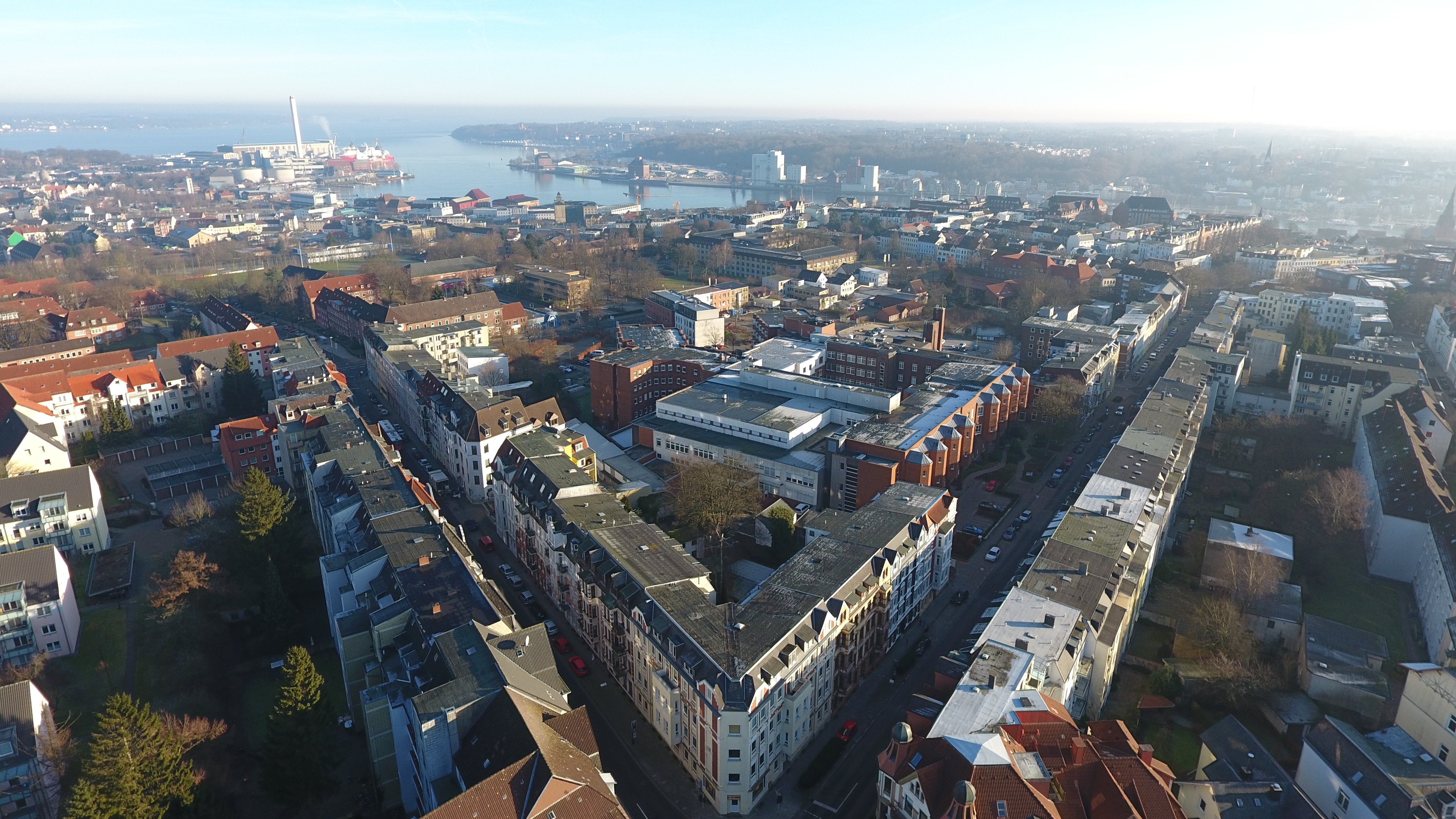 Blick auf das Franziskus Krankenhaus Flensburg